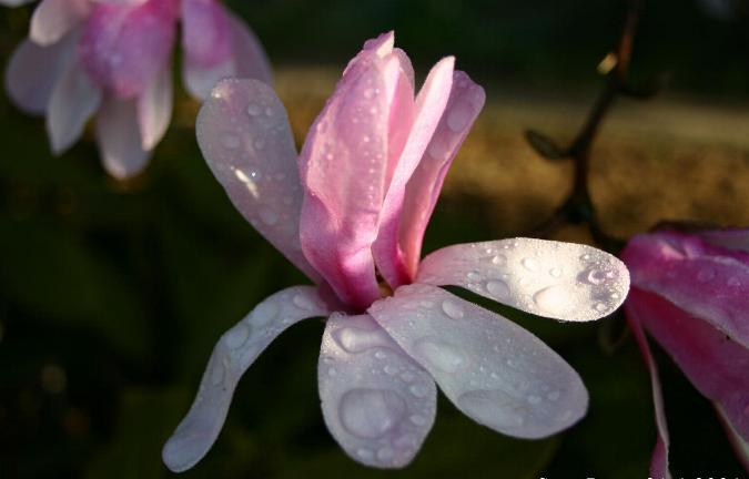 Magnolia × loebneri: Flower.